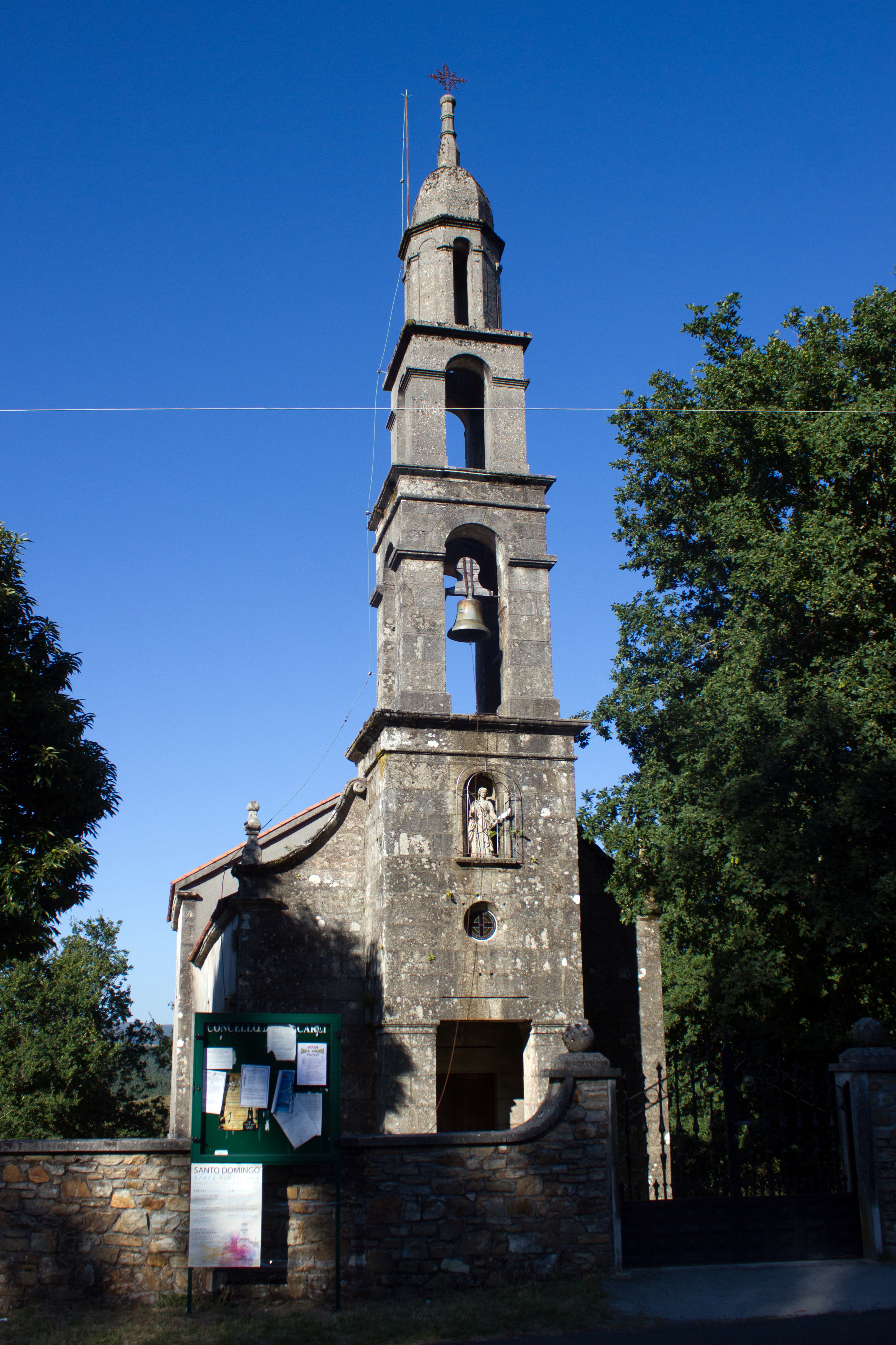 Igrexa de Santa Mariña de Presqueiras, no concello de Forcarei.